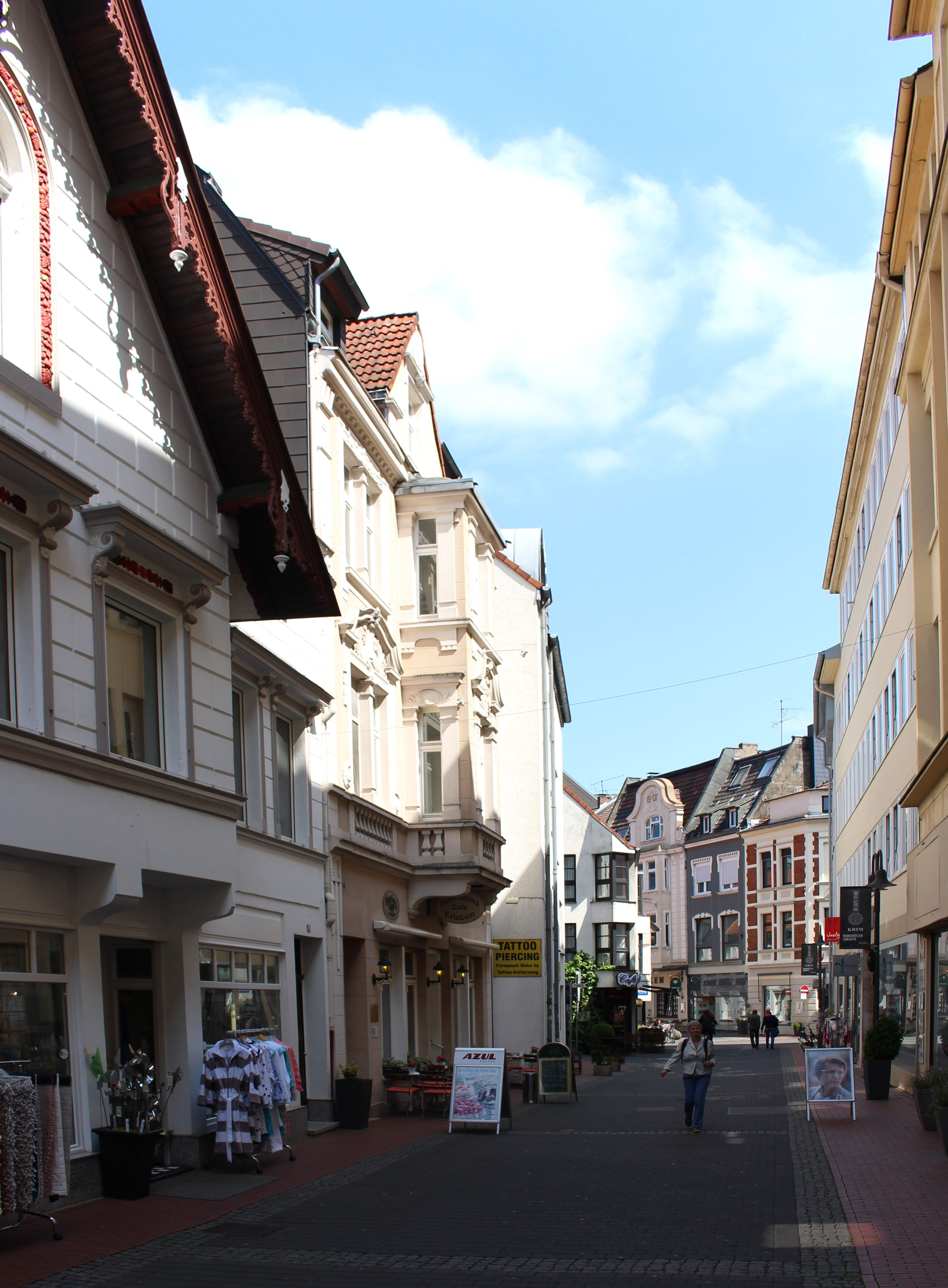 Gasse in der Altstadt - Münsterstraße, Recklinghausen